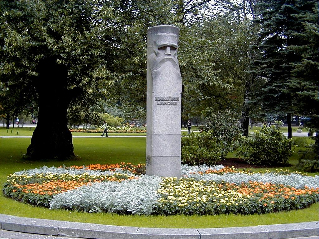 Rīga, K. Barona piemineklis Vērmaņdārzā 2000-08-31